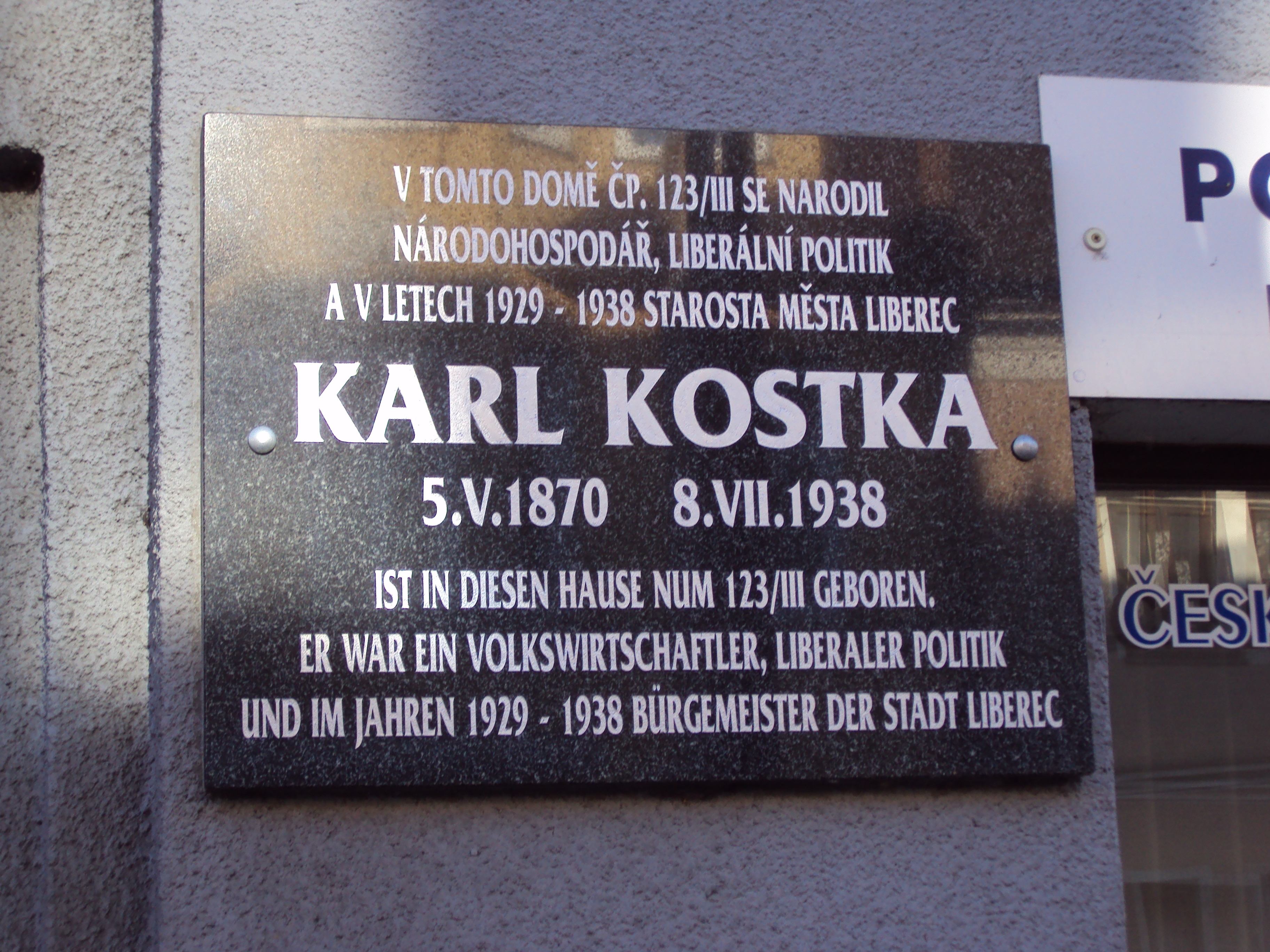 Mimoň III, Mírová č. p. 123, pamětní deska Karl Kostka.